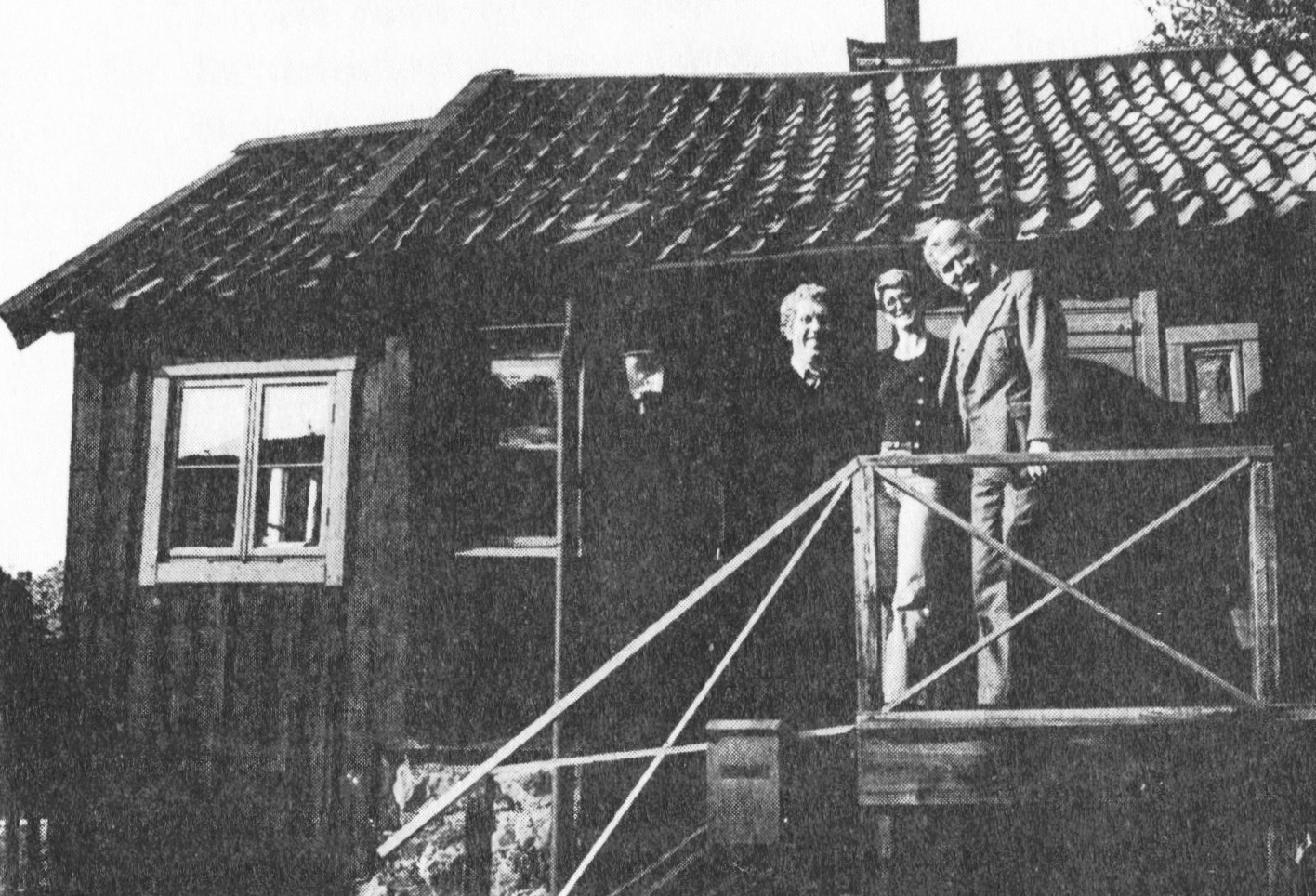 Tage Danielsson, Mona Haskel och Hans Alfredson på trappan framför AB Svenska Ords skrivstuga.